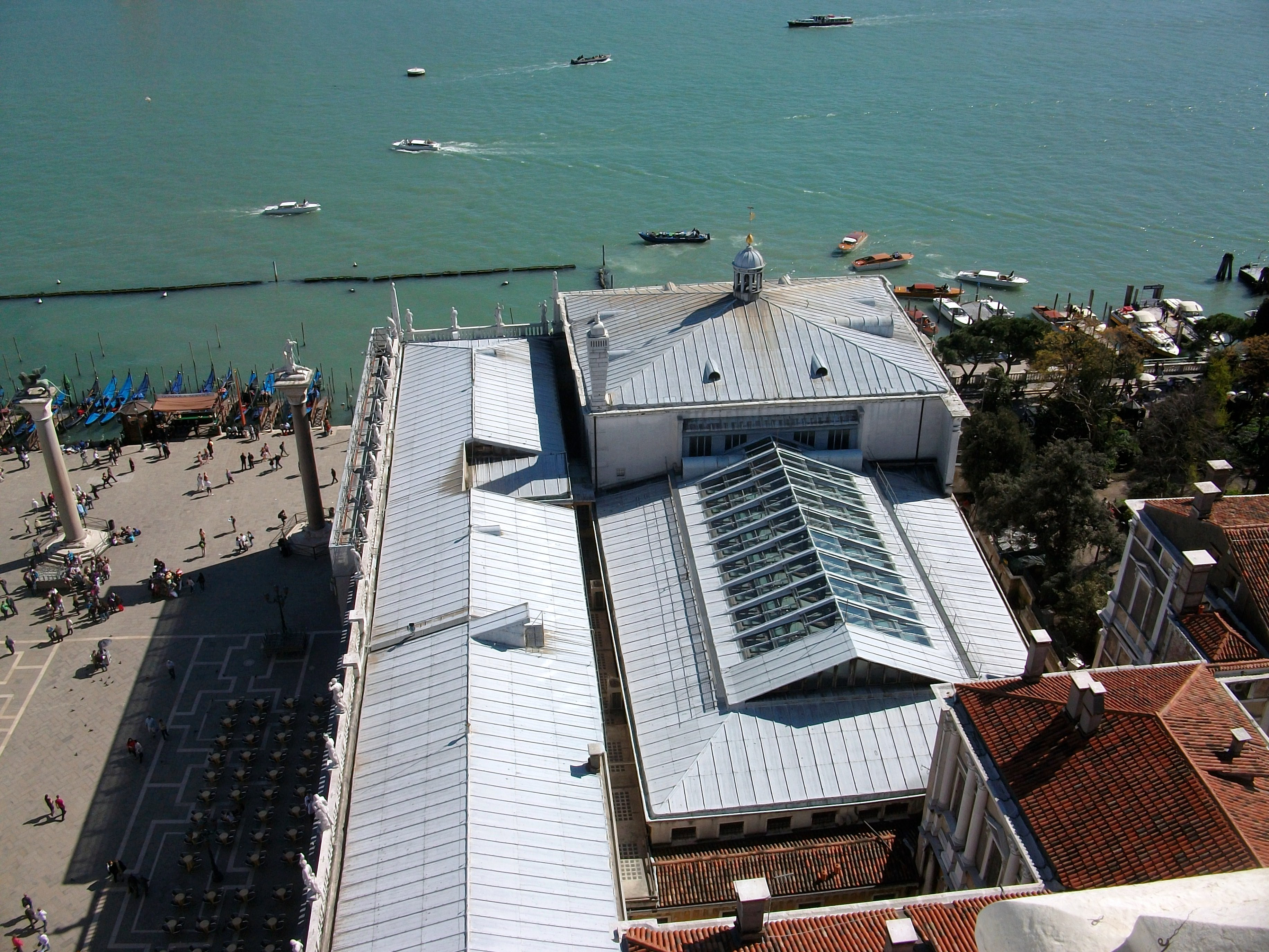 Biblioteca Marciana i Zecca des del campanar de sant Marc, Venècia.